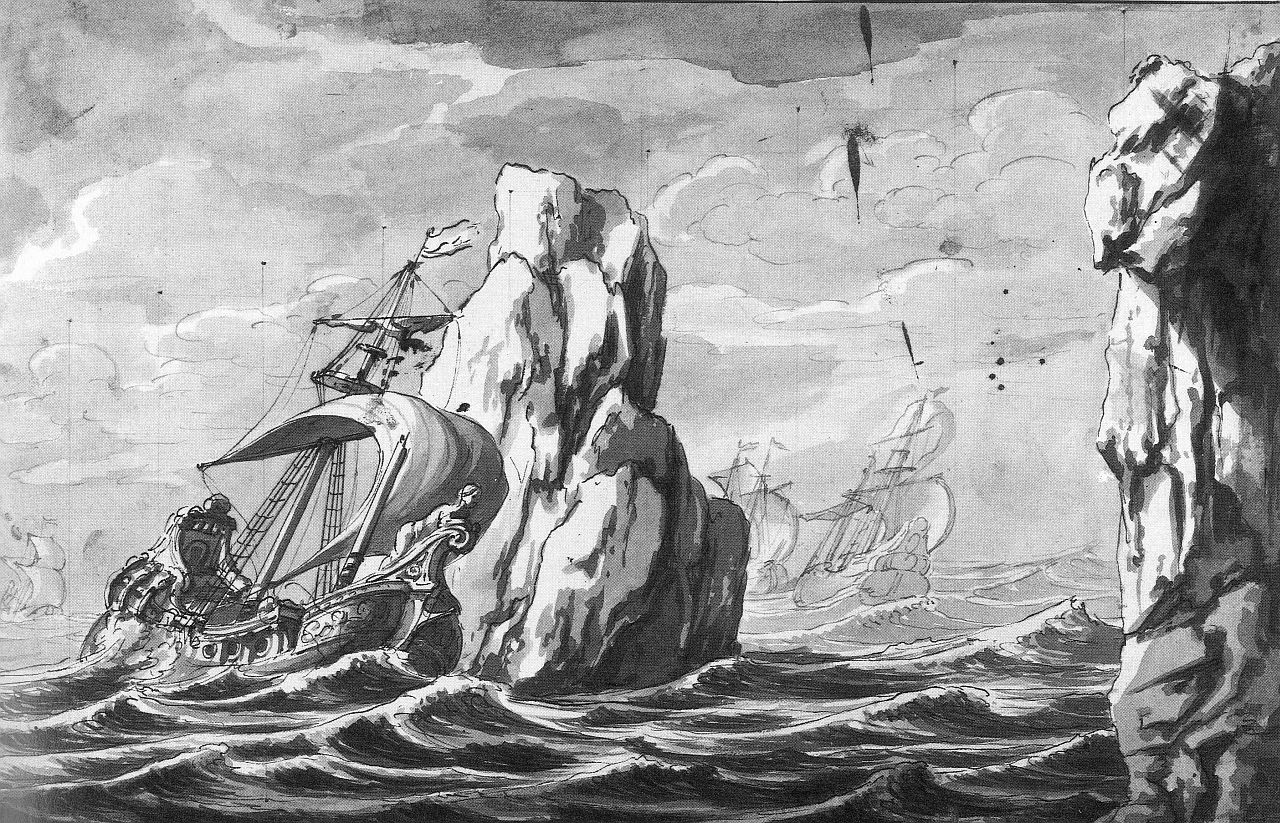 Bühnenbild um 1696 von Johann Oswald Harms für die Oper Enrico Leone von Agostino Steffani.